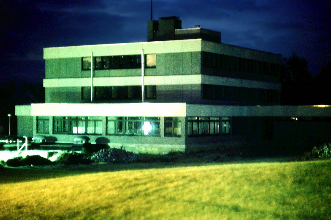 Gebäude der PATVN